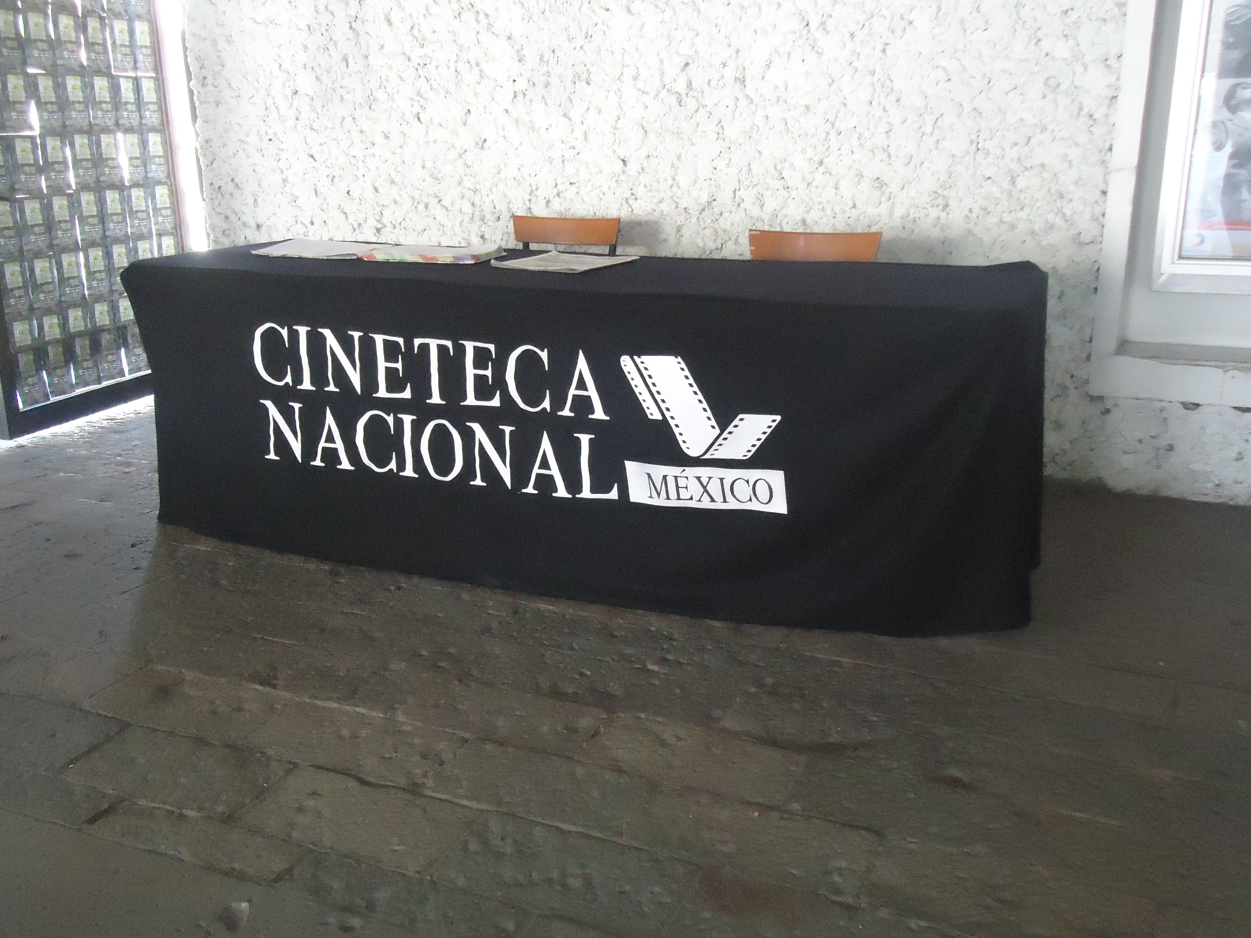 Cineteca Nacional, Mexico-City. logo